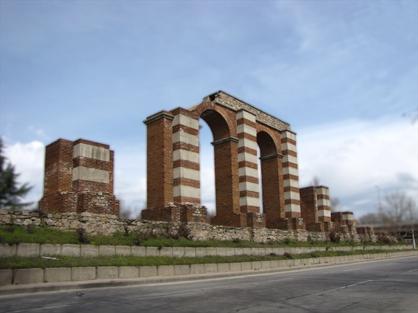 Акведукт